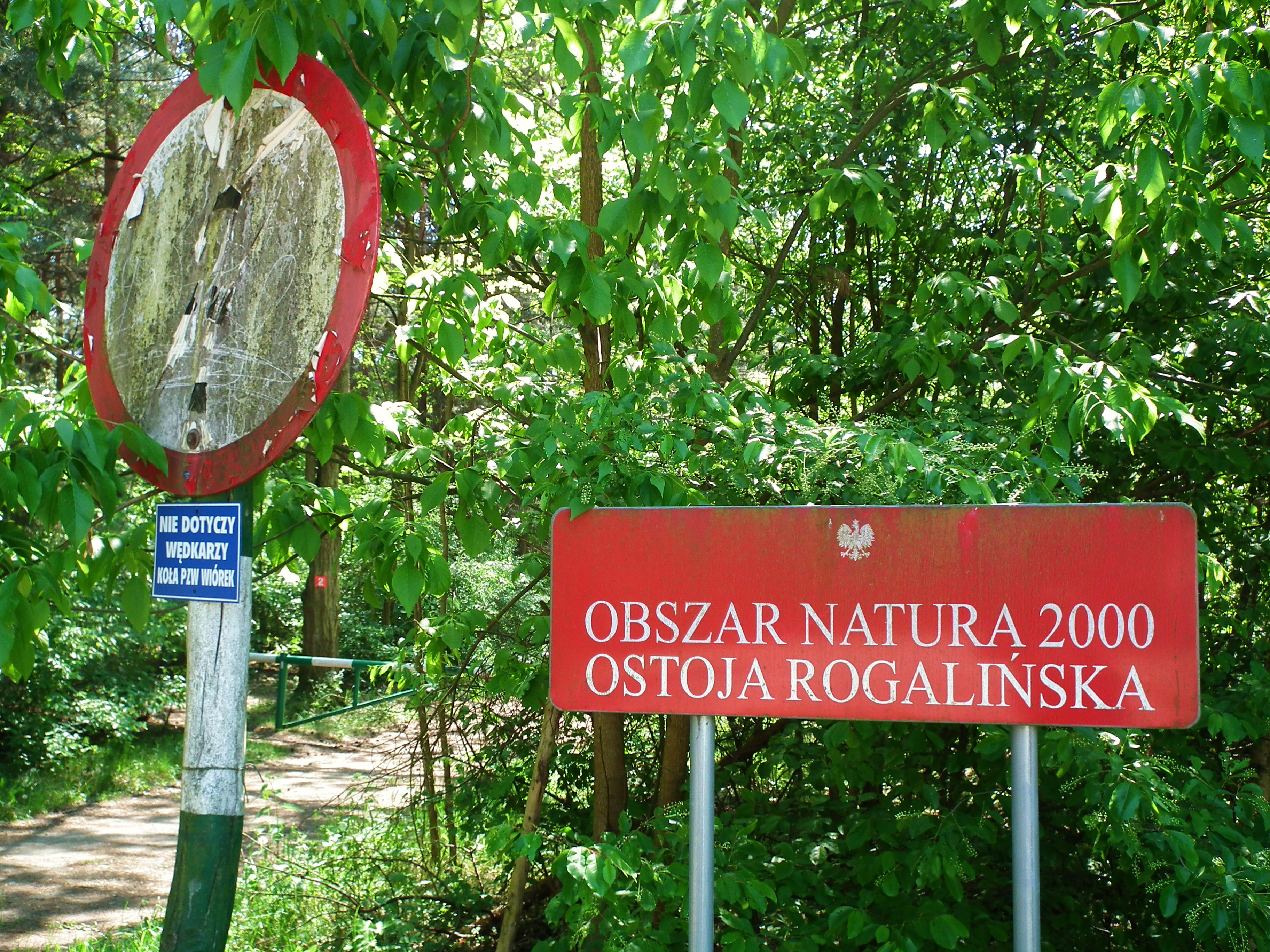 Obszar Natura 2000 Ostoja Rogalińska.